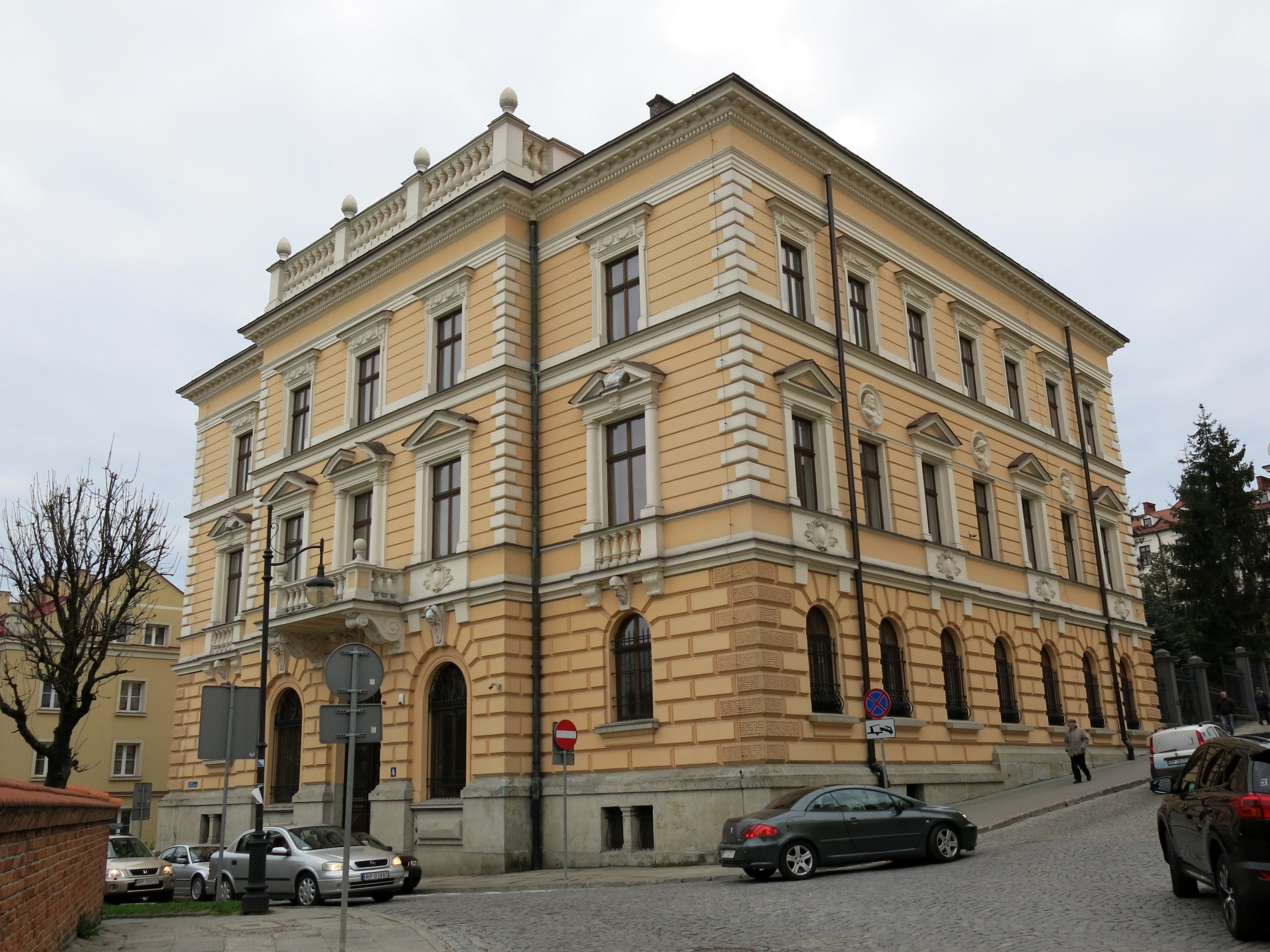 Palác řeckokatolických biskupů (1897), Přemyšl, Tadeusza Czackiego, pl. 3